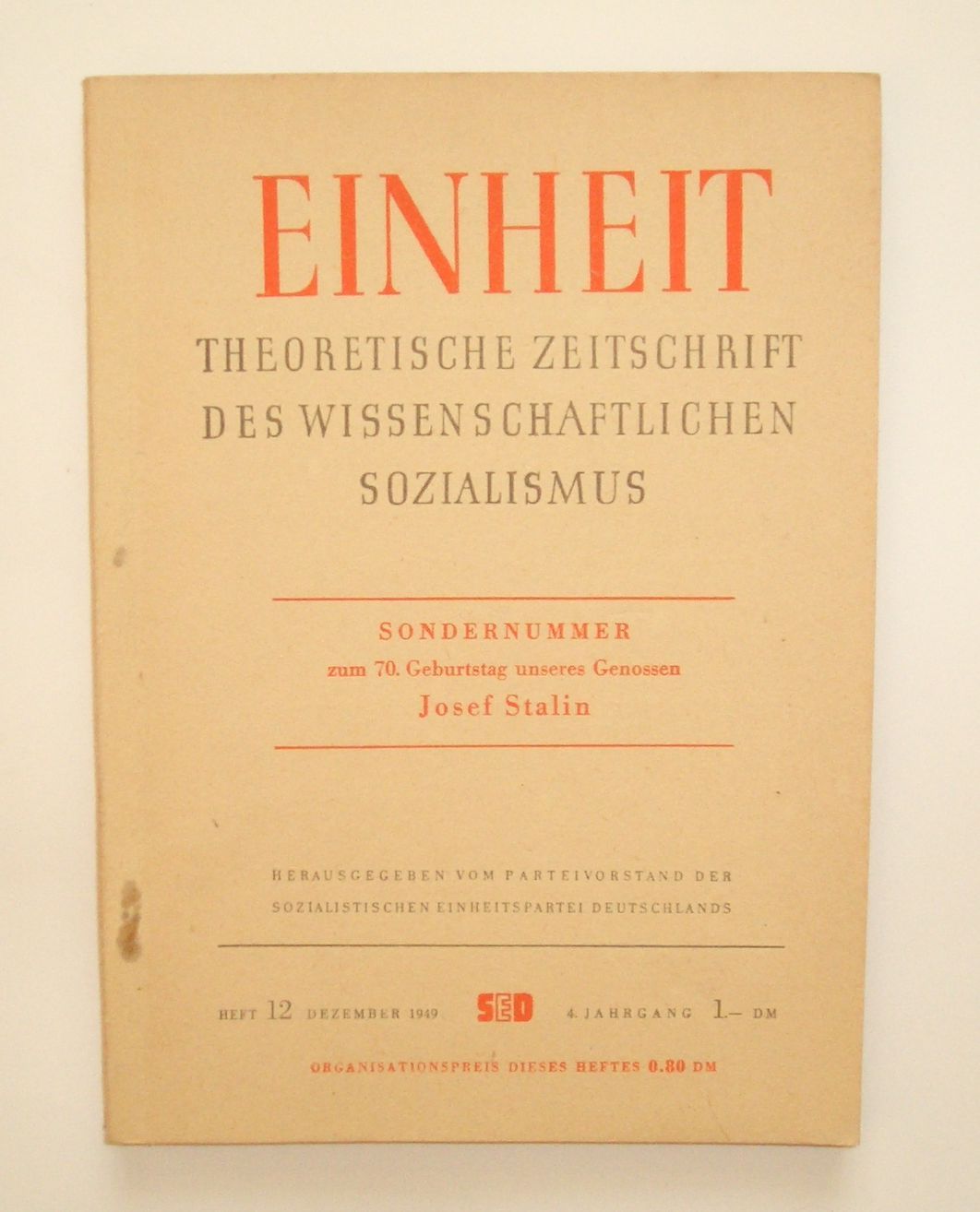 Einheit. Theoretische Zeitschrift des wissenschaftlichen Sozialismus. Sondernummer zum 70. Geburtstag unseres Genossen Josef Stalin. Herausgegeben vom Parteivorstand der Sozialistischen Einheitspartei Deutschlands. Sonderheft Dezember 1949. Dietz Verlag Berlin